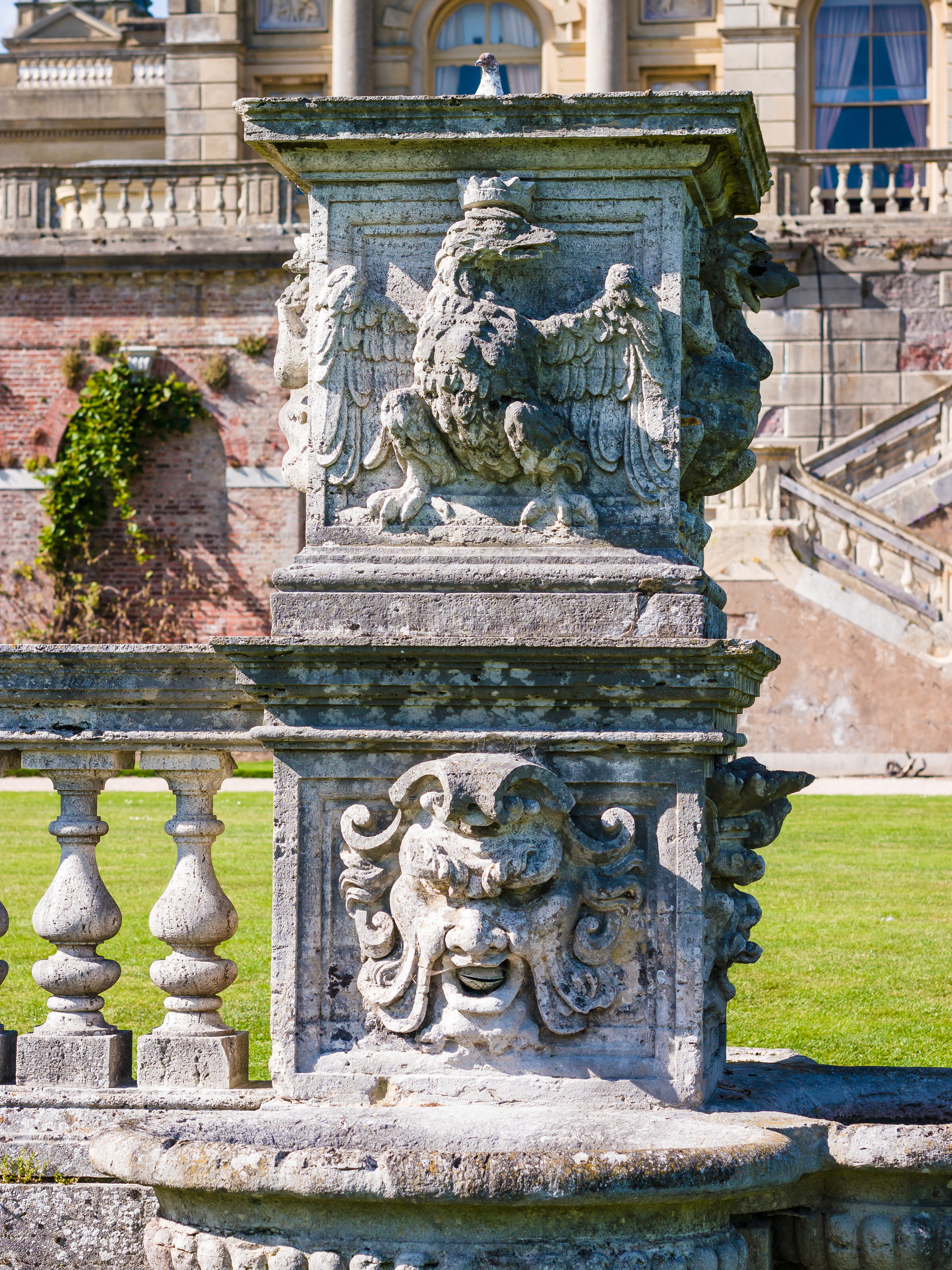 Cliveden